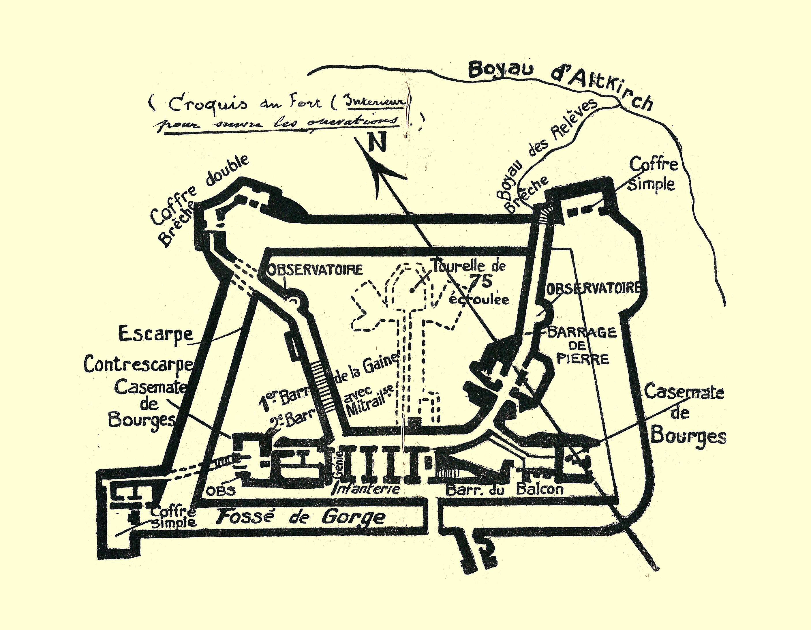 Croquis du Fort de Vaux, dressé par Sylvain Eugène Raynal.